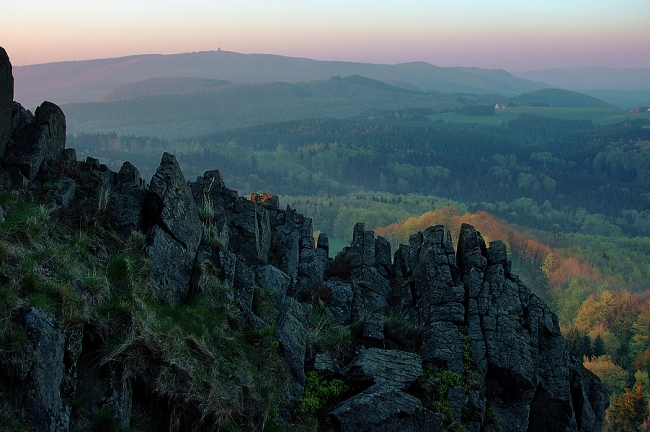 View from Milseburg to Wasserkuppe